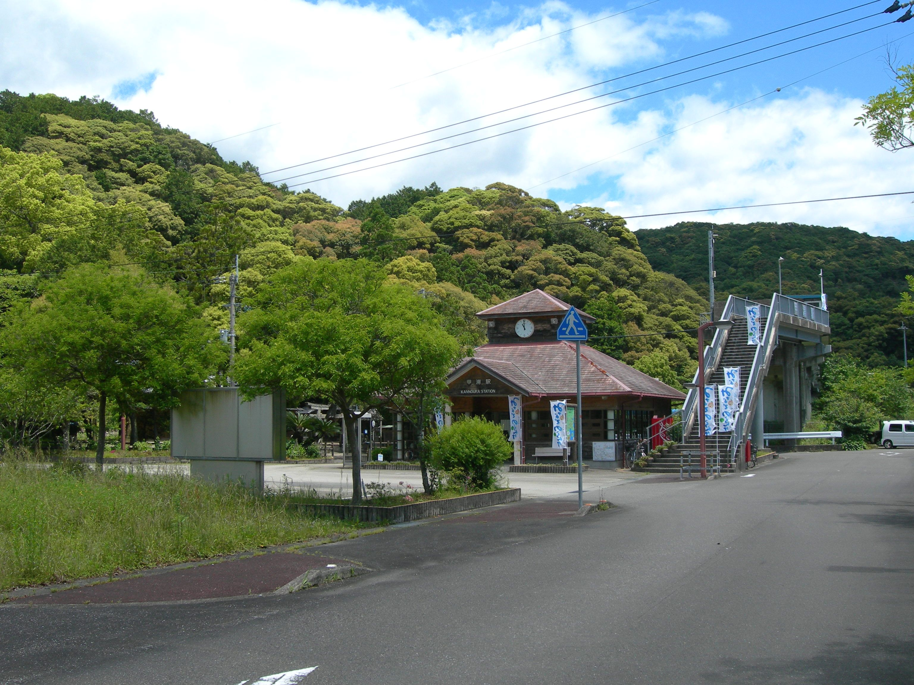 阿佐海岸鉄道・甲浦駅遠景